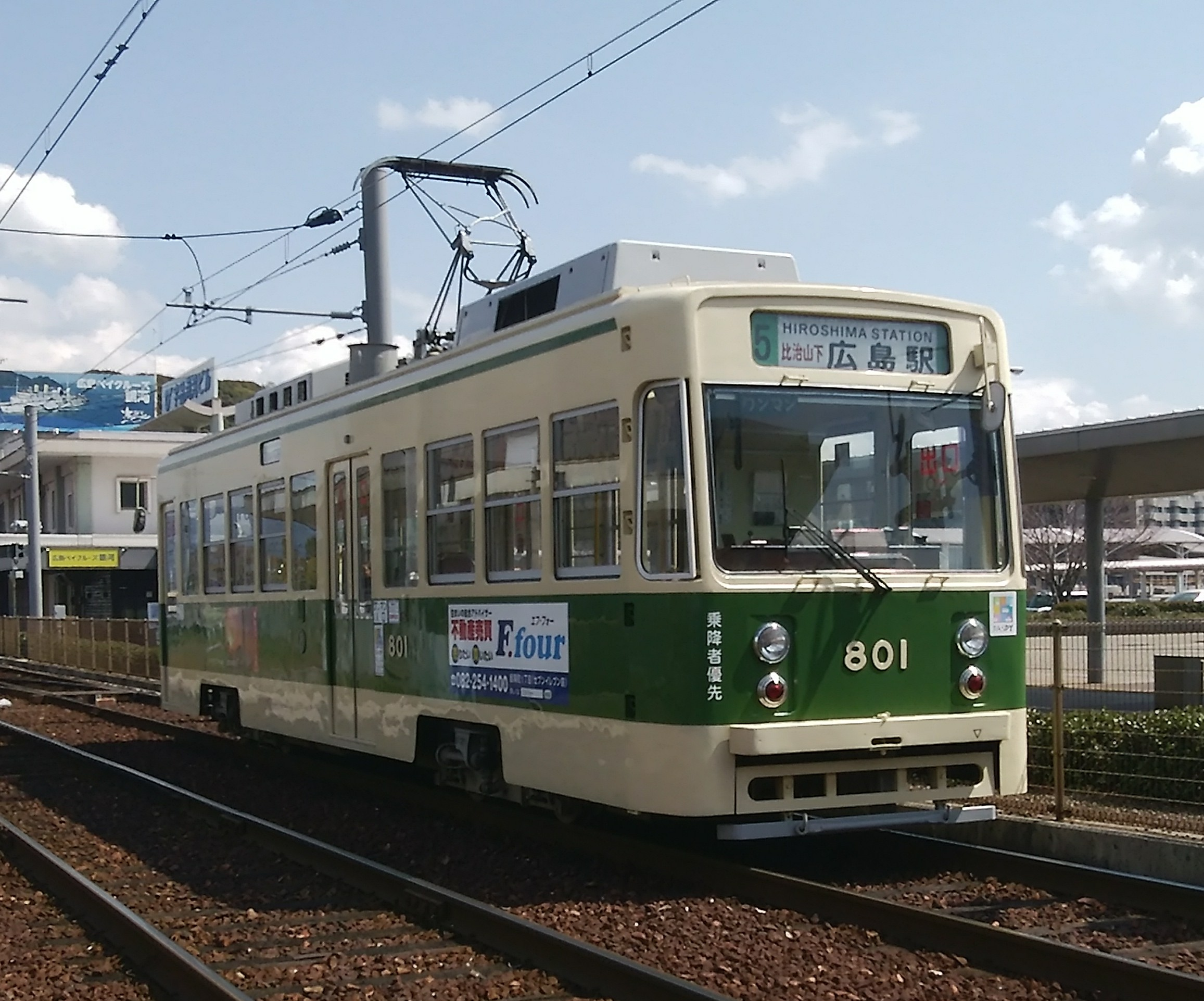 広島港電停に入線する801号